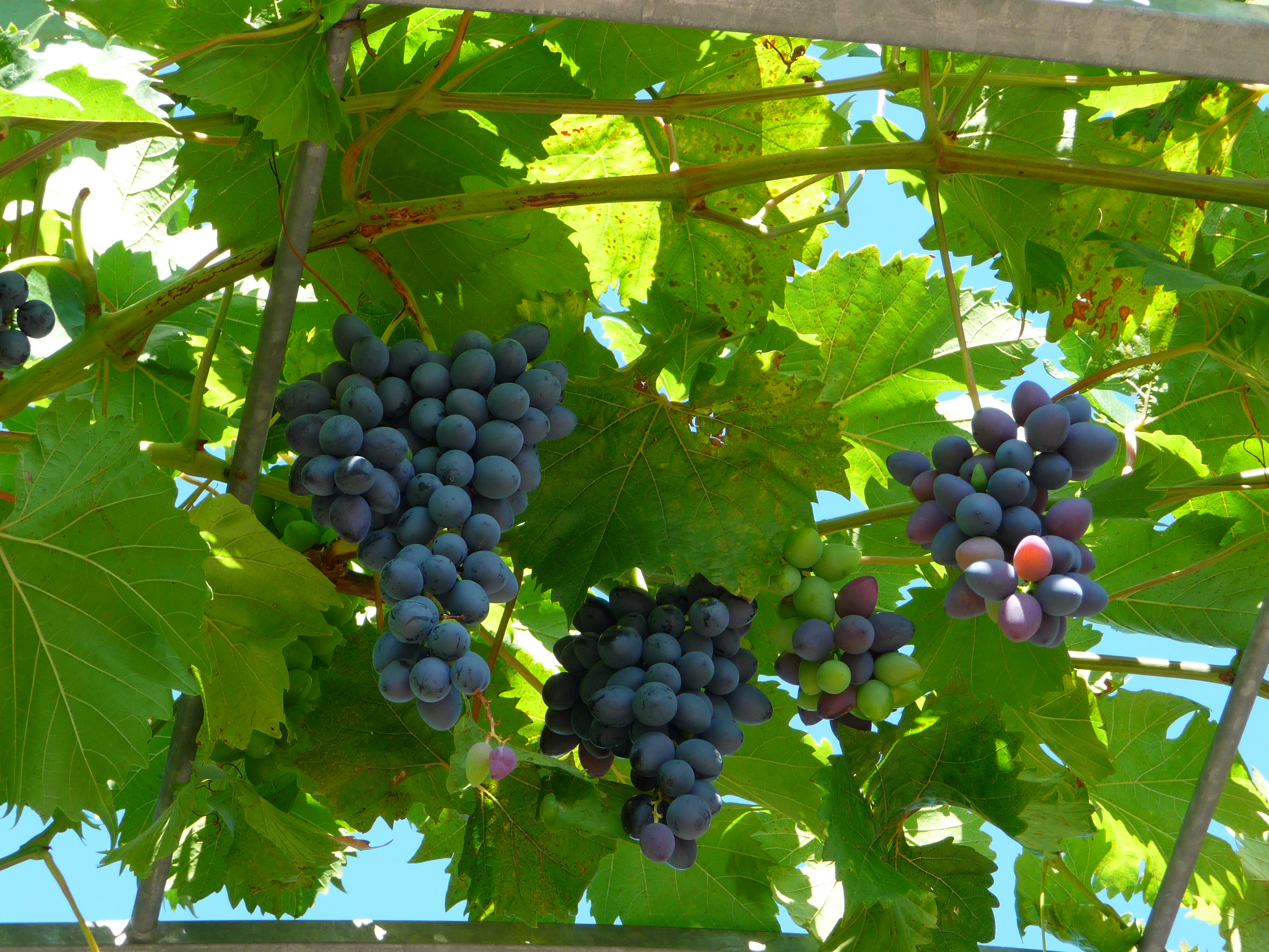 Muskat Blue Trauben, Reife Anfang bis Mitte August